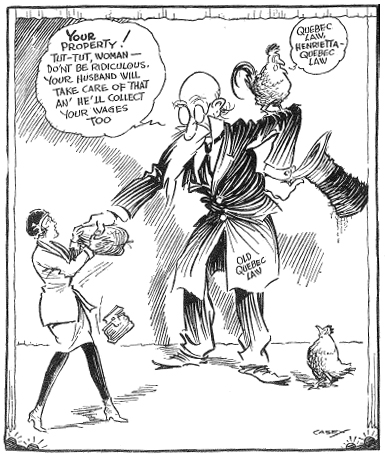 Caricature extraite du journal montréalais anglophone Montreal Herald, 22 novembre 1929